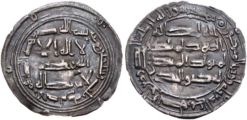 Dirrã do emir omíada do Alandalus Abderramão I